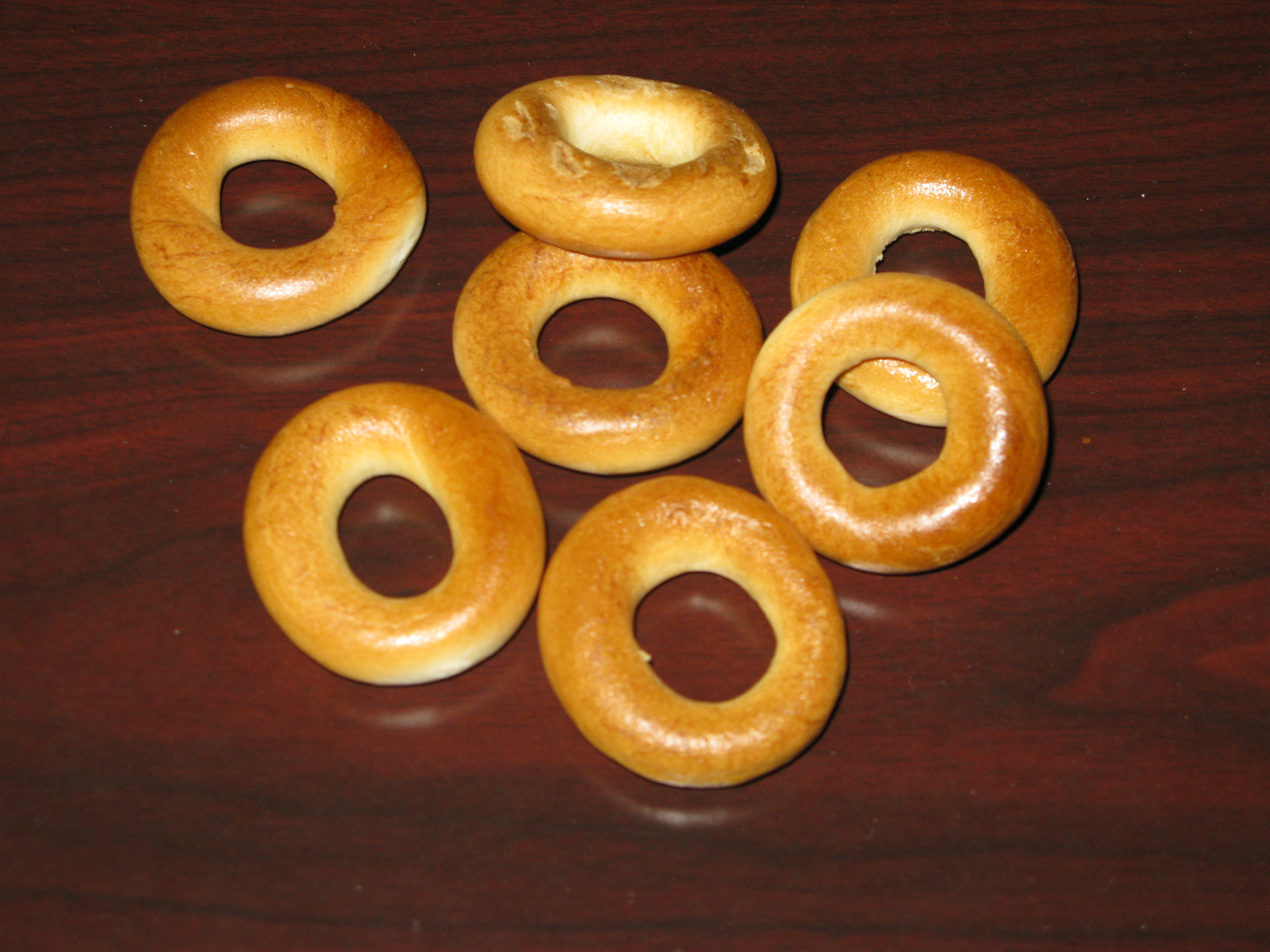 Russian Sooshki